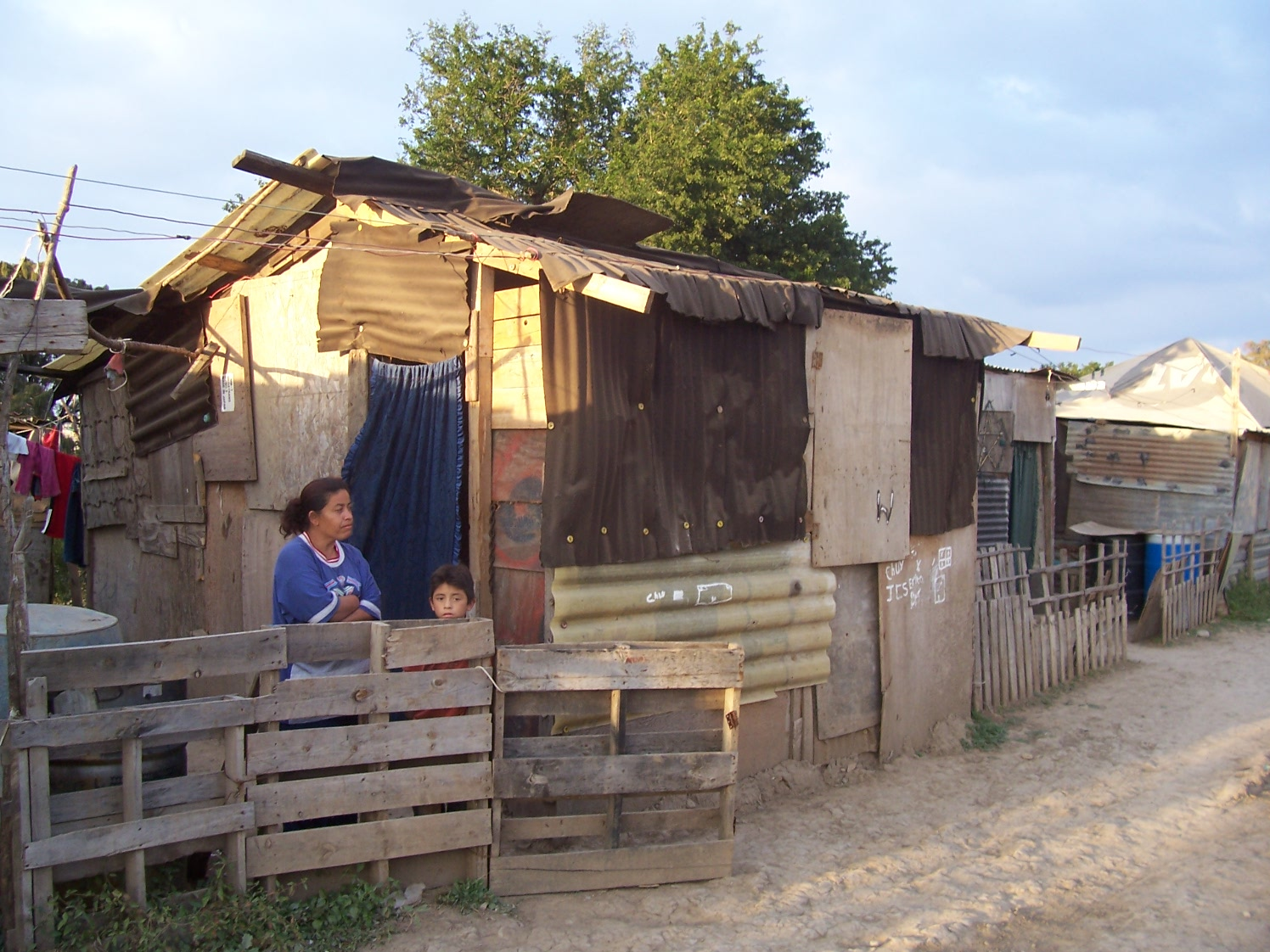 Asentamiento marginado "Colinas del Río", en el municipio Benito Juárez del Estado de Nuevo León en México. Diciembre de 2005. Fotografía tomada por usuario LeCire Marginalized settlement "Colinas del Río", in the municipality Benito Juárez of the State of Nuevo León in Mexico. December of 2005. Photography taken by user LeCire